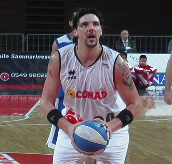 Román González in lunetta per un tiro libero, dietro di lui il croato Damir Tvrdić, nel corso del match Basket Rimini Crabs vs. Aironi Novara.